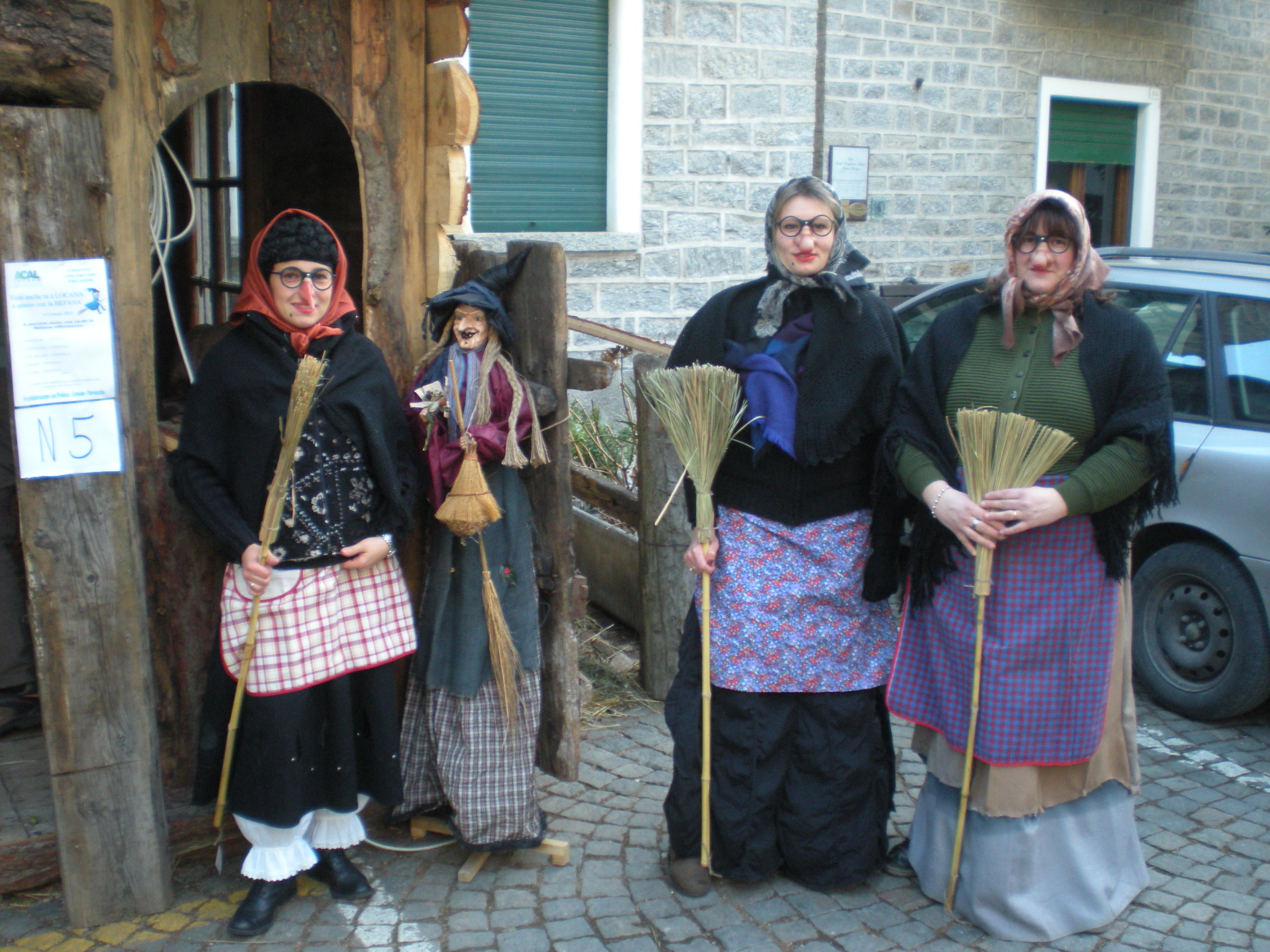 Emiliàn e rumagnòl: Tri befàni tòlti śò al 6 ad śnar dal 2012 a Locana in Piemónt